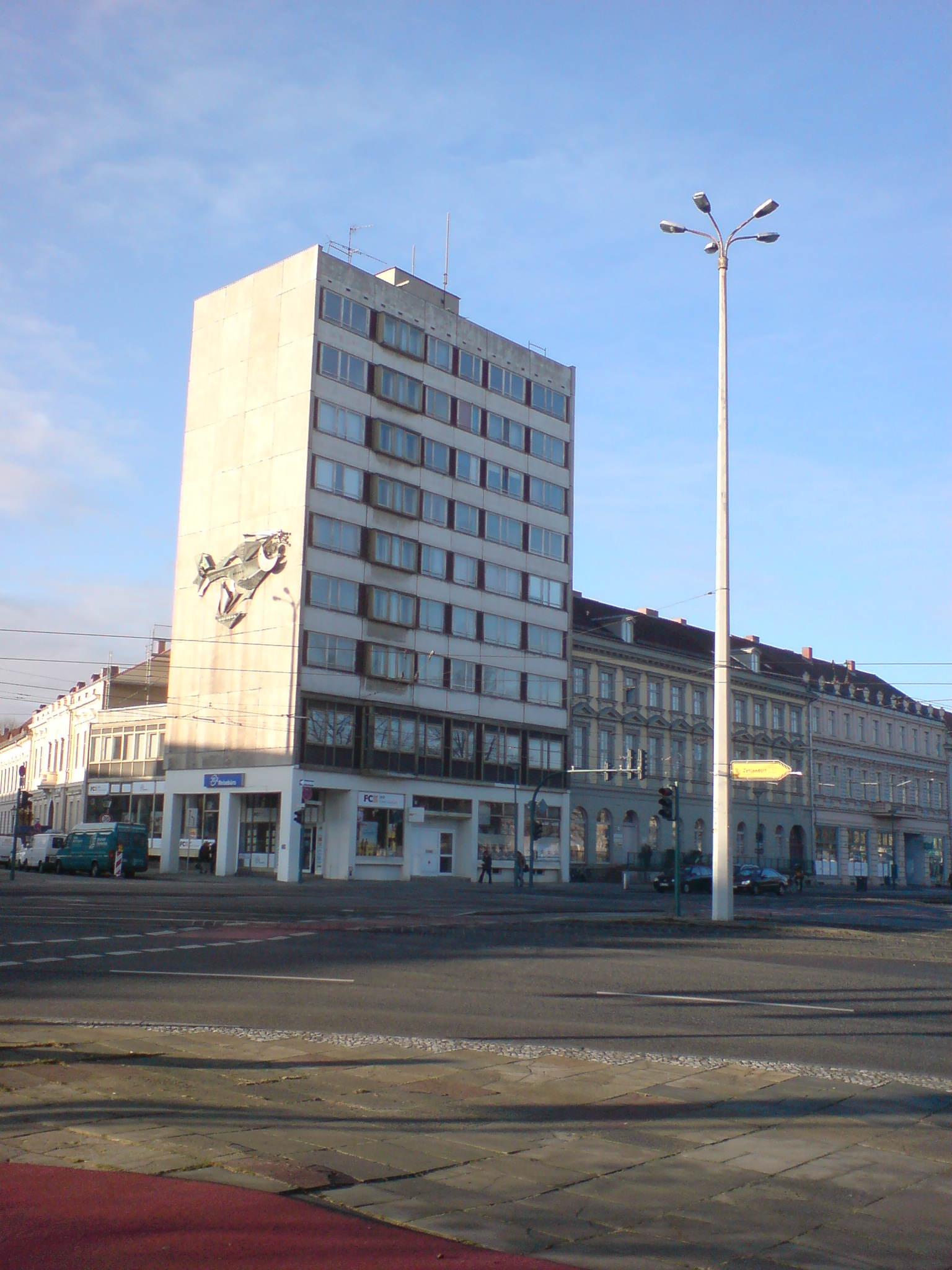 Haus des Reisens am Platz der Einheit in Potsdam. In der ersten Etage befand sich zu DDR-Zeiten außerdem die Dispatcherzentrale des Verkehrsbetriebs. Das Gebäude wurde Ende 2009 abgerissen.